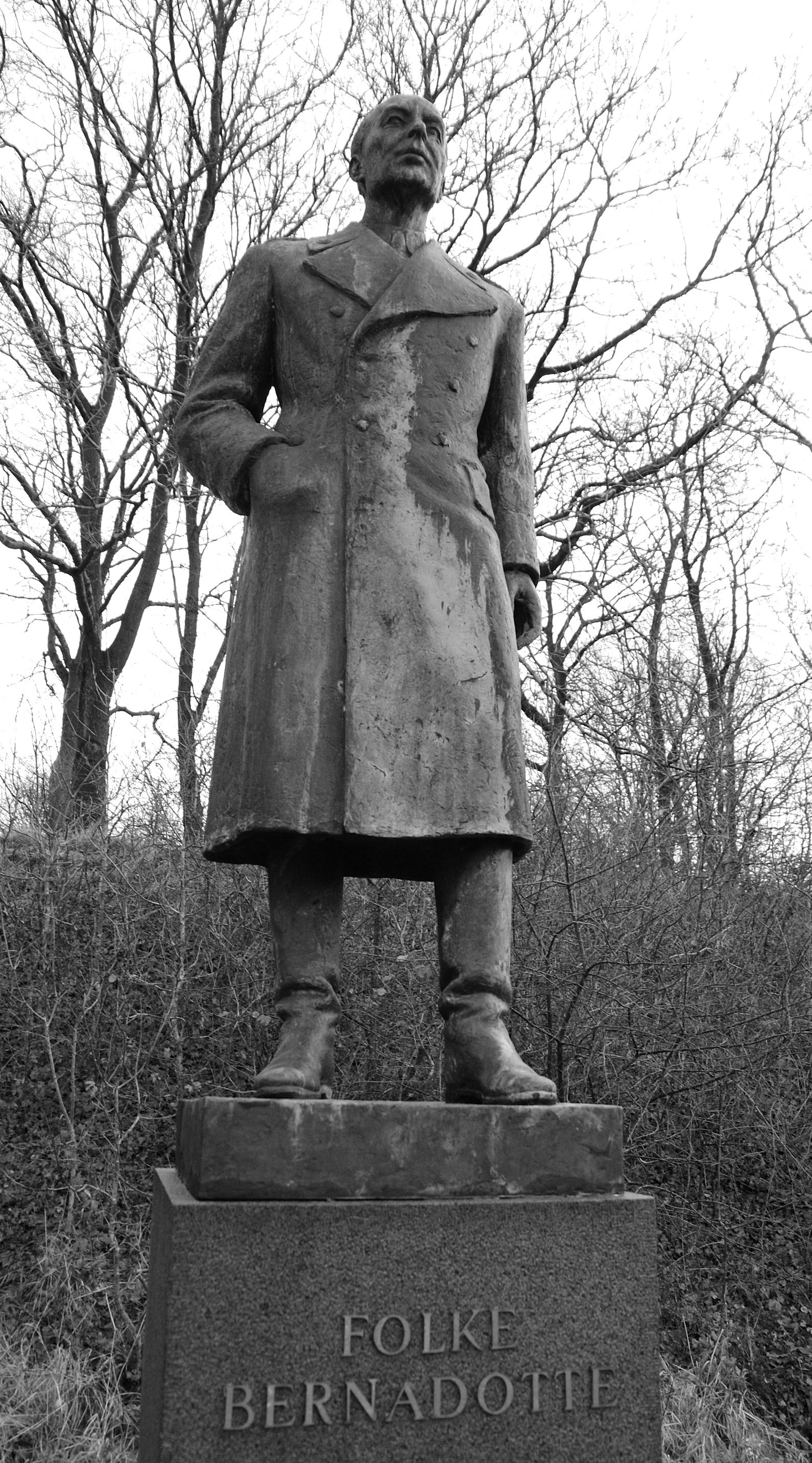 Folke Bernadotte monument in Kruså, Denmark